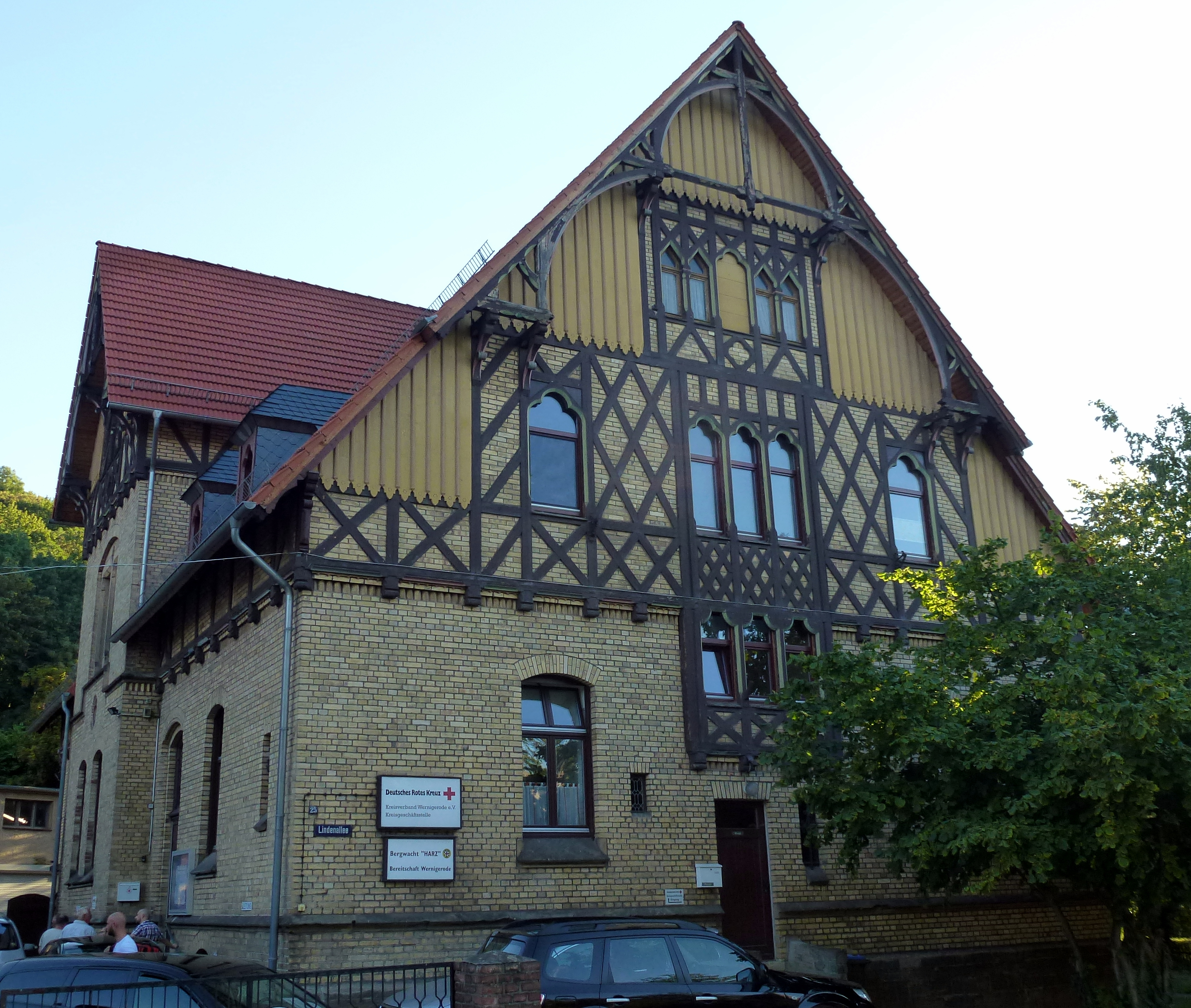 Das denkmalgeschützte Haus Lindenallee 25 in Wernigerode wird vom DRK Kreisverband genutzt.